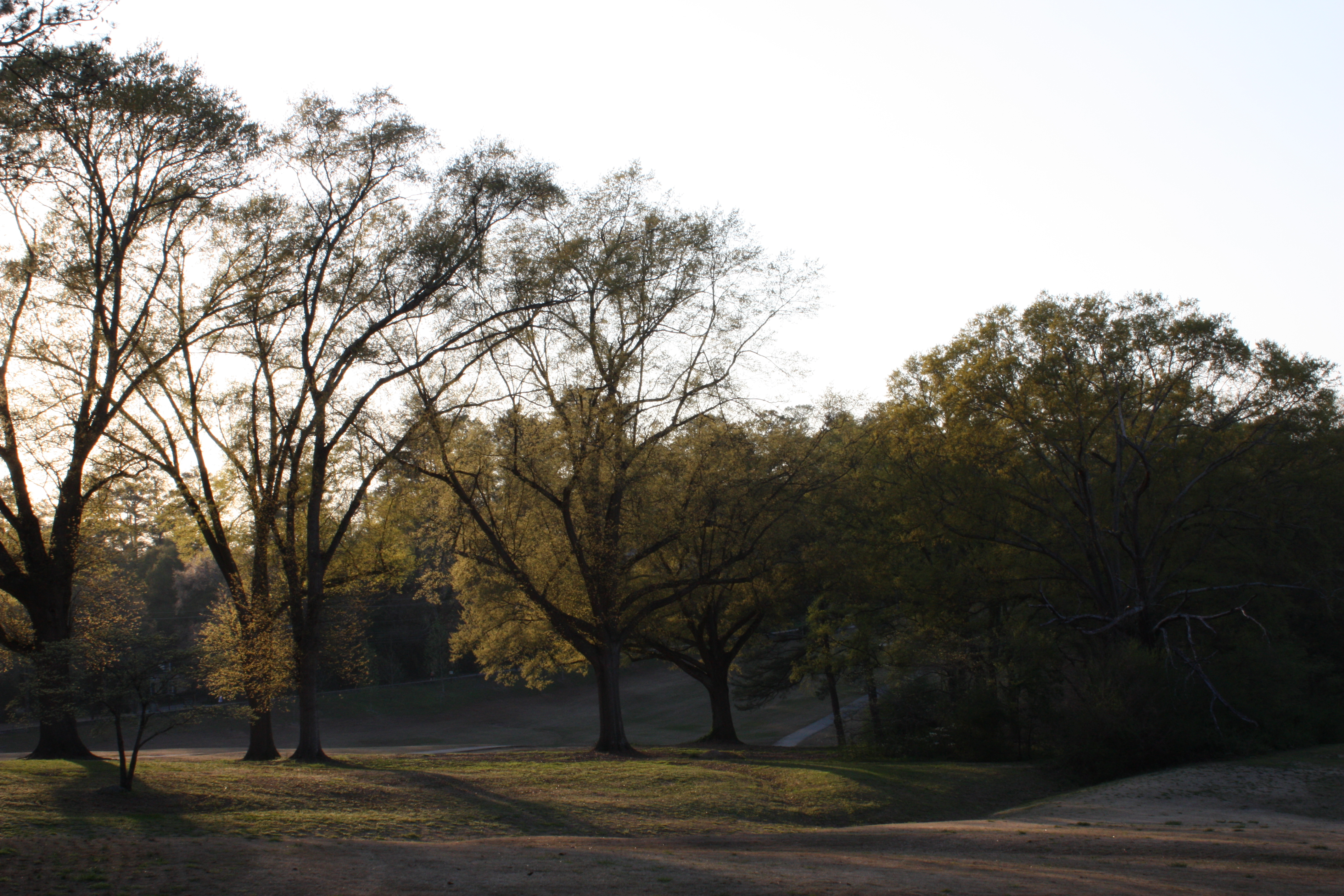 Spring 2010